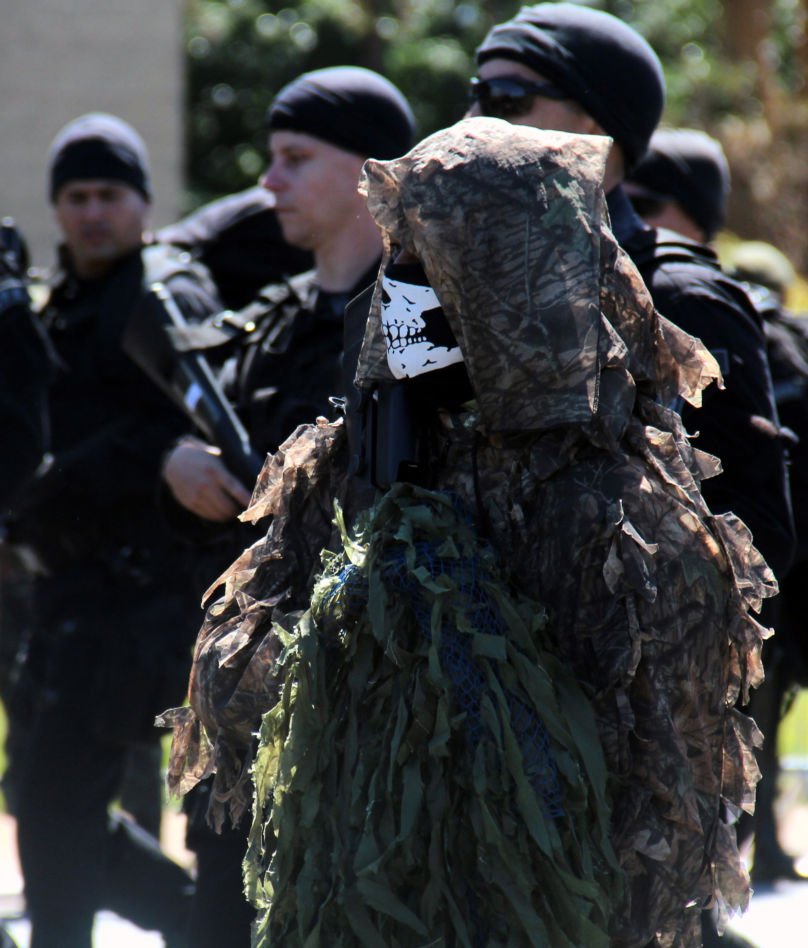 Atirador de elite, ou sniper, do Batalhão de Operações Especiais (BOPE) da PMDF.